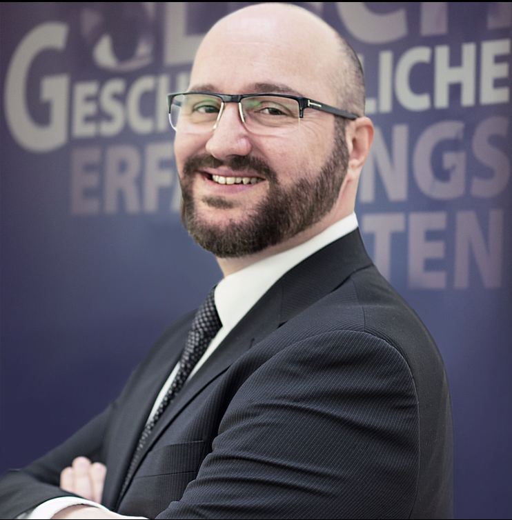 Portrait von Jörg Litwinschuh. Februar 2016. Foto: Sabine Hauf.